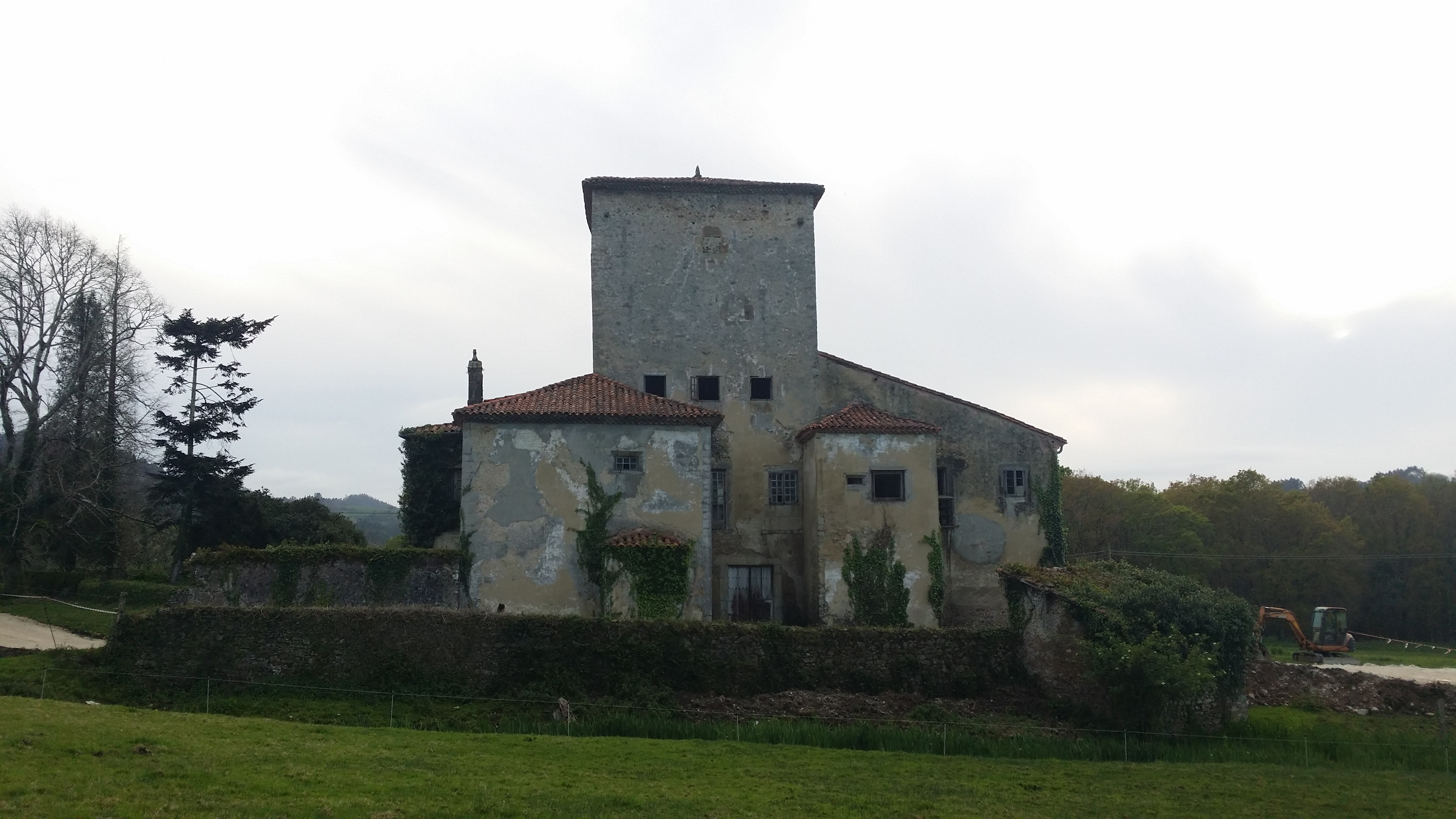 Parte lateral de la Torre y Capilla de Arango